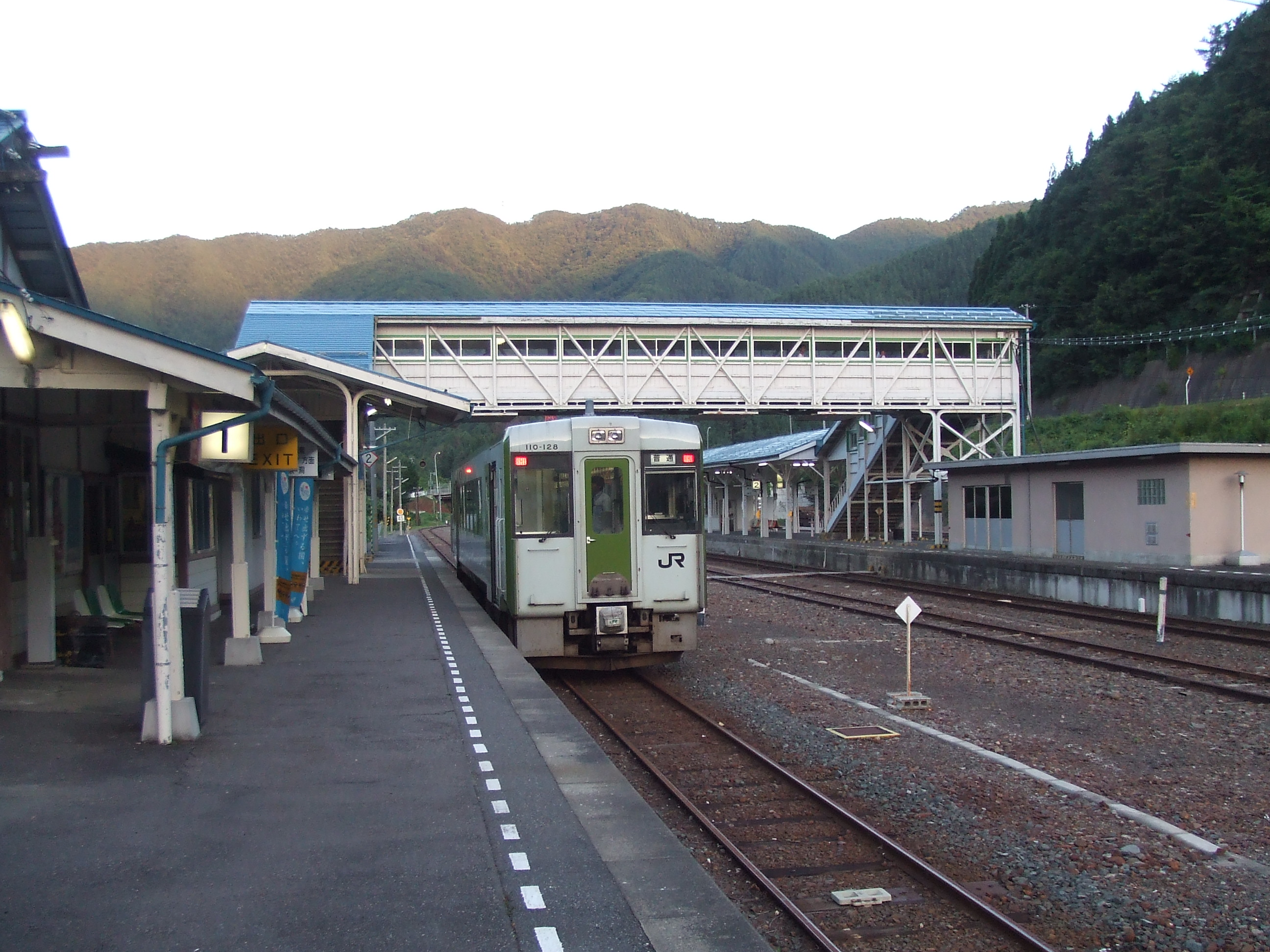 茂市駅 駅構内